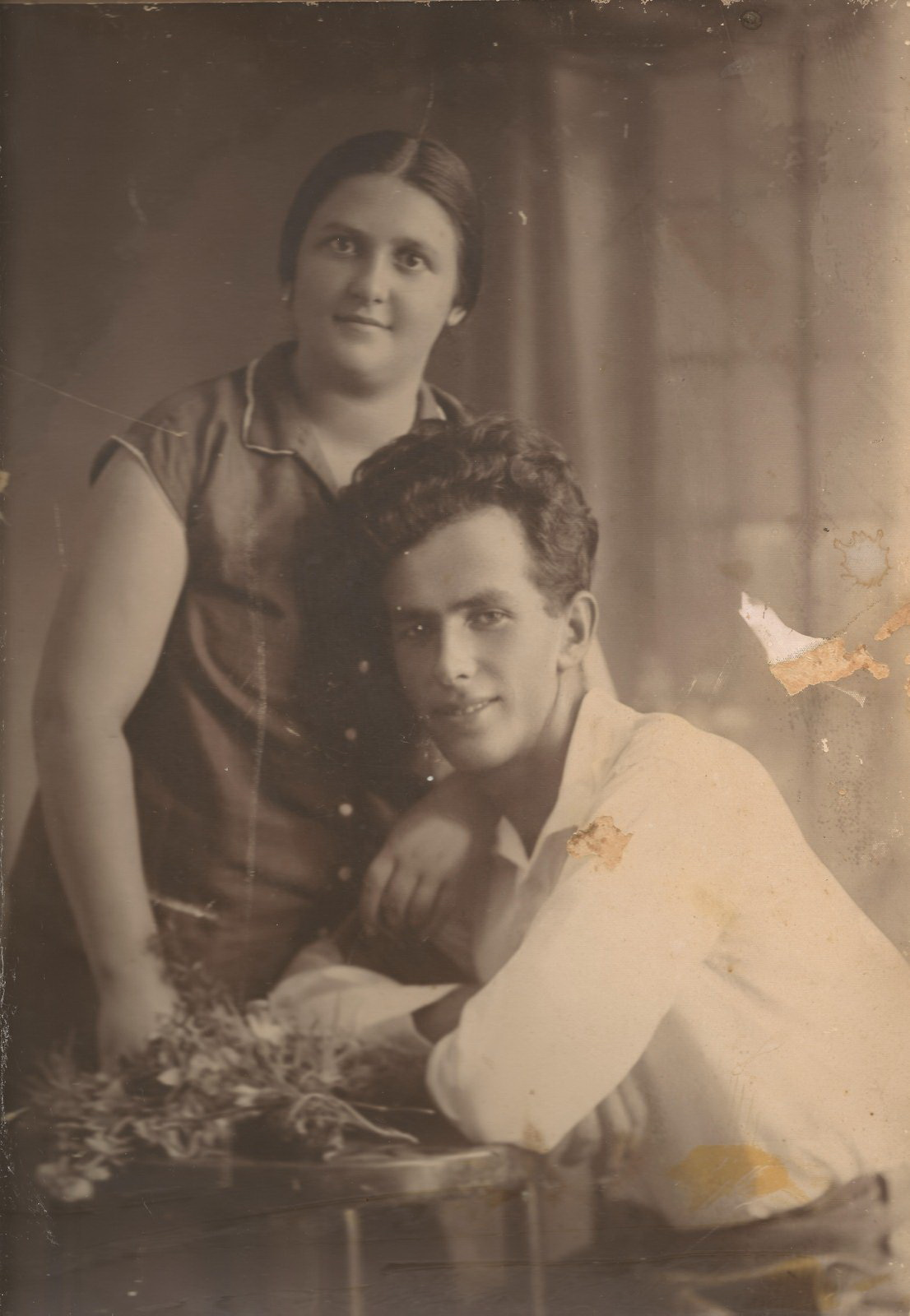 יצחק אלחנן חסקין היה ממייסדי כפר ביל"ו חבר בוועדה המרכזת של הועד הפועל של ההסתדרות הכללית ושימש גם כגזבר ההסתדרות בתמונה ביום חתונה עם אשתו נחמה